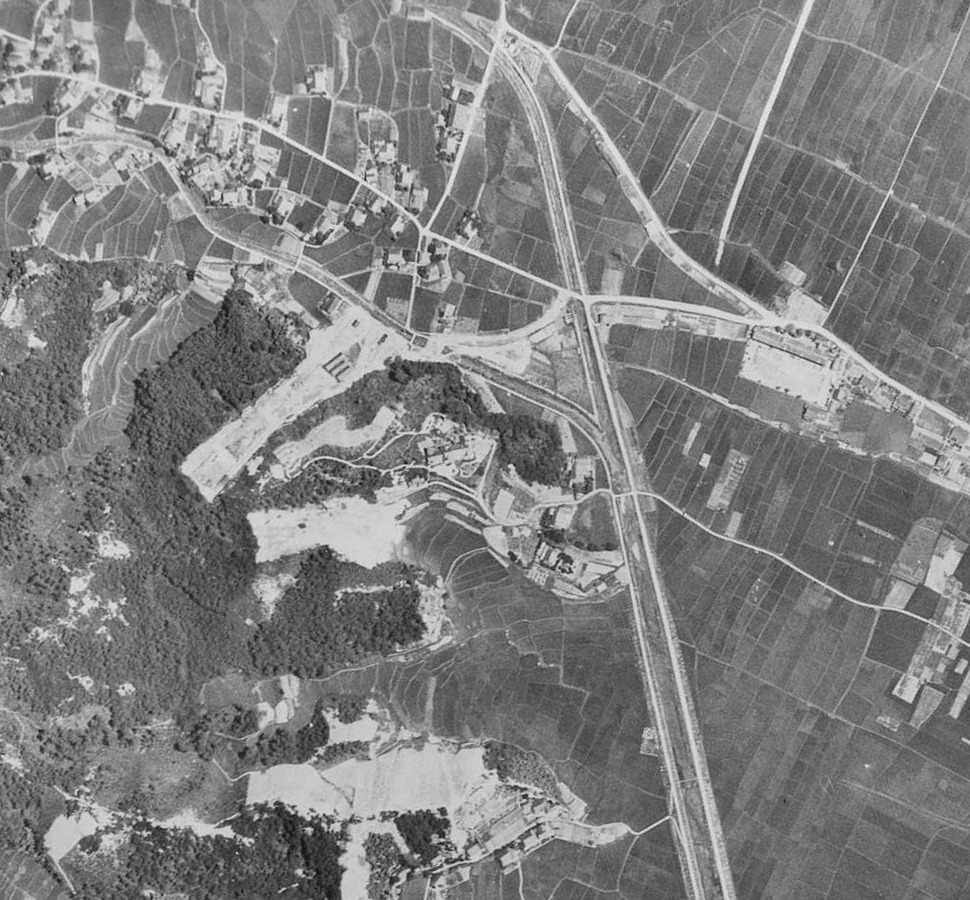 1947年7月25日広島原爆投下直前の広島市長束修練院